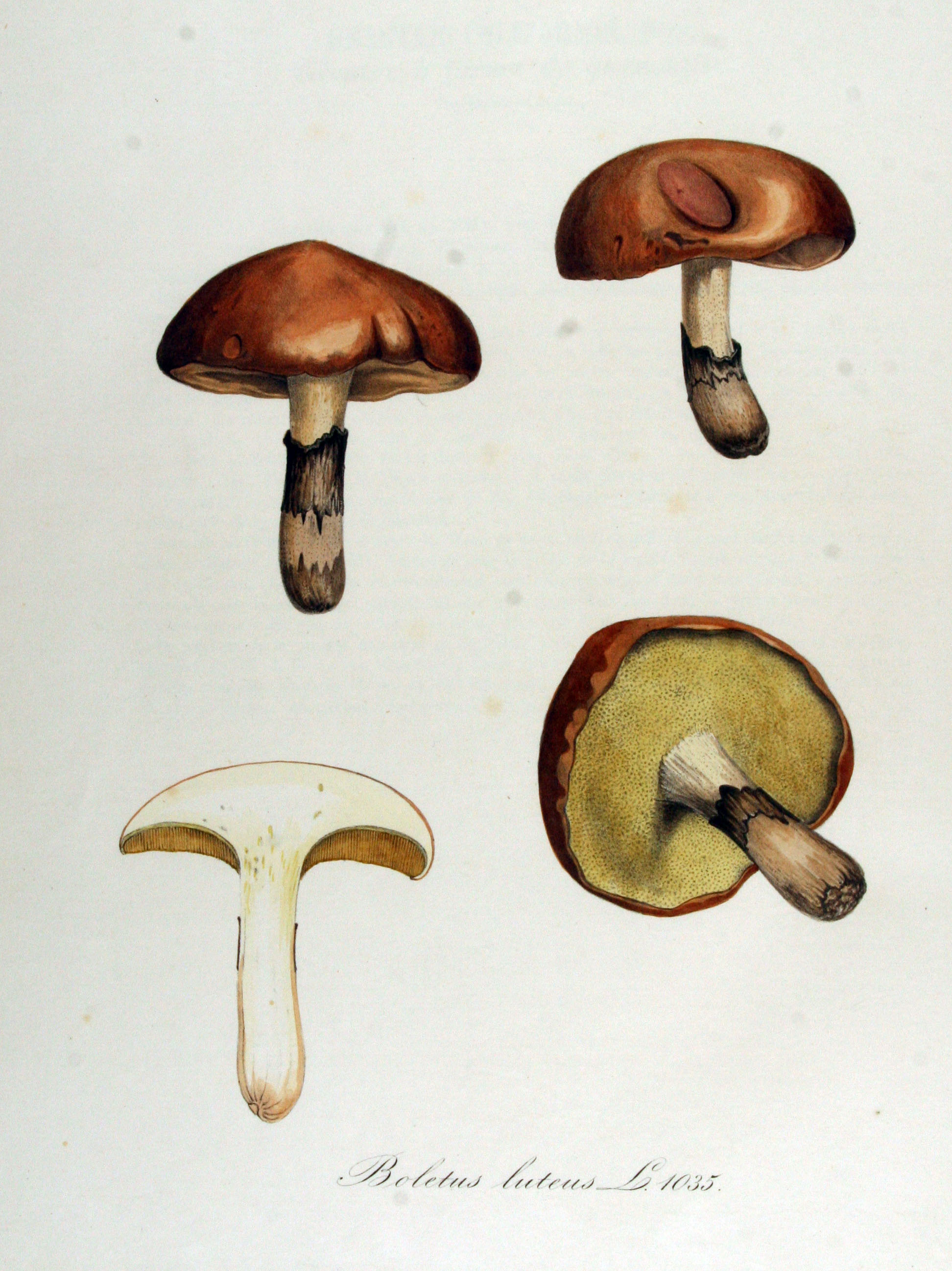 Boletus luteus